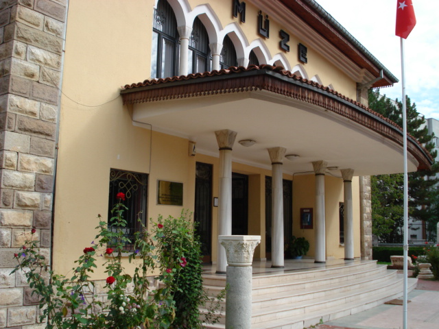 Dosya yükleyen kullanıcıya aittir. Resimdeki bina Isparta ilinin Yalvaç ilçesinde bulunan Yalvaç Müzesidir.